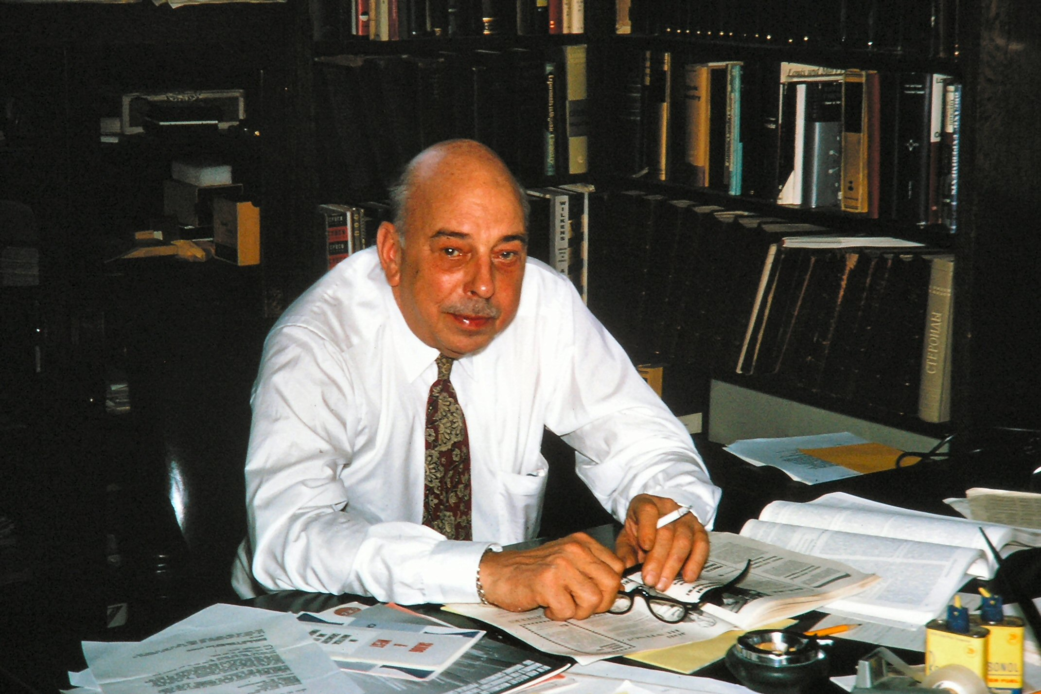 Louis Frederick Fieser, 1965, Cambridge (Mass.)